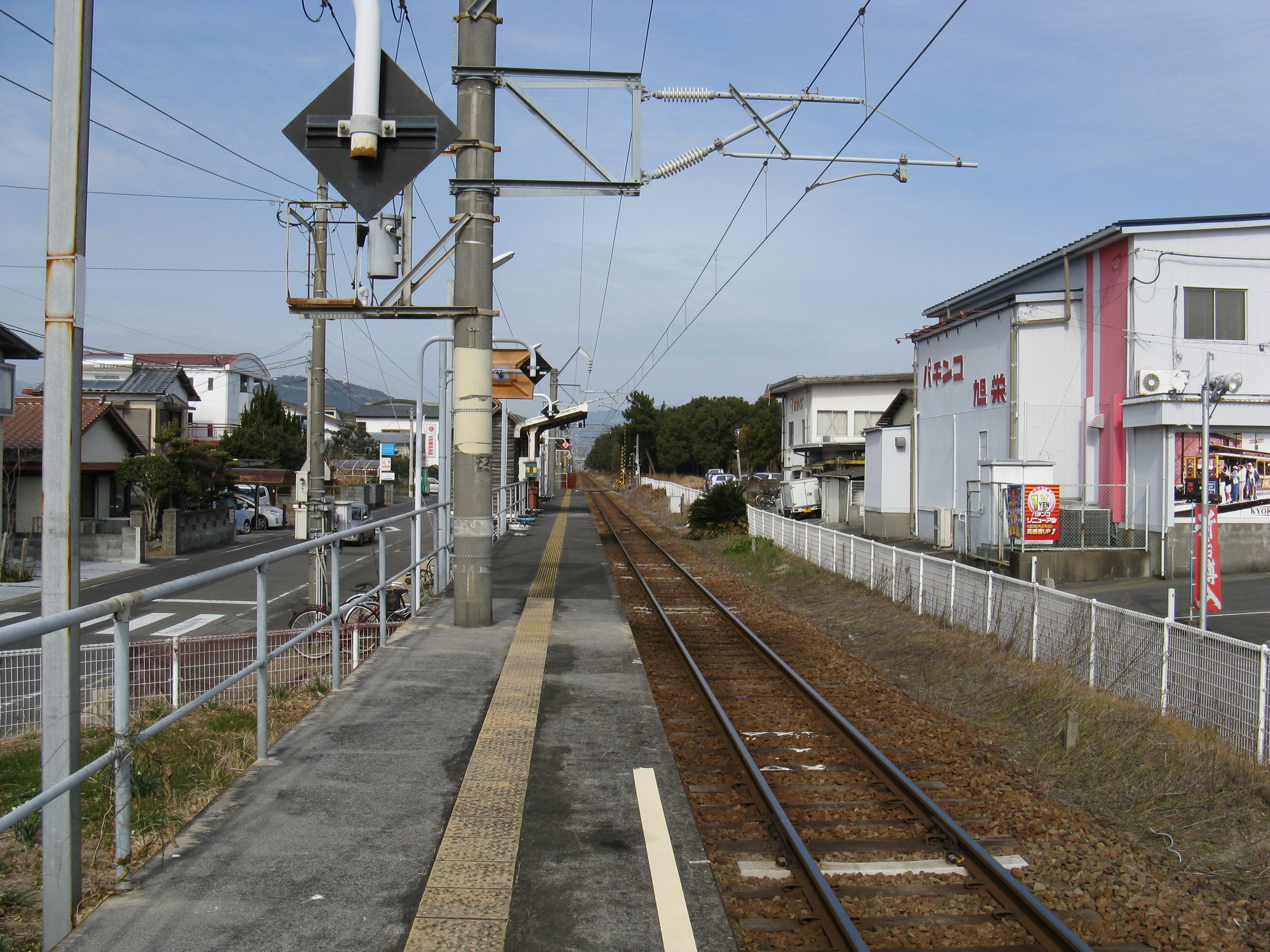 JR九州日豊本線 旭ヶ丘駅（延岡市） 延岡方面